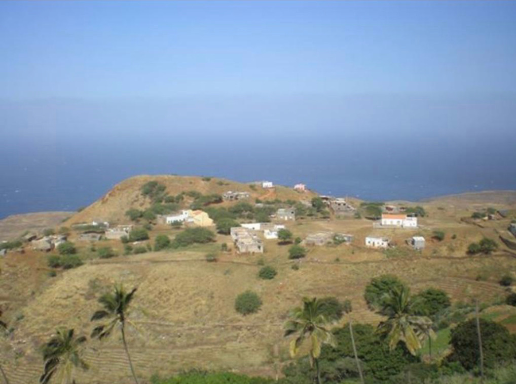 Chà de Norte, Santo Antao, Cabo Verde